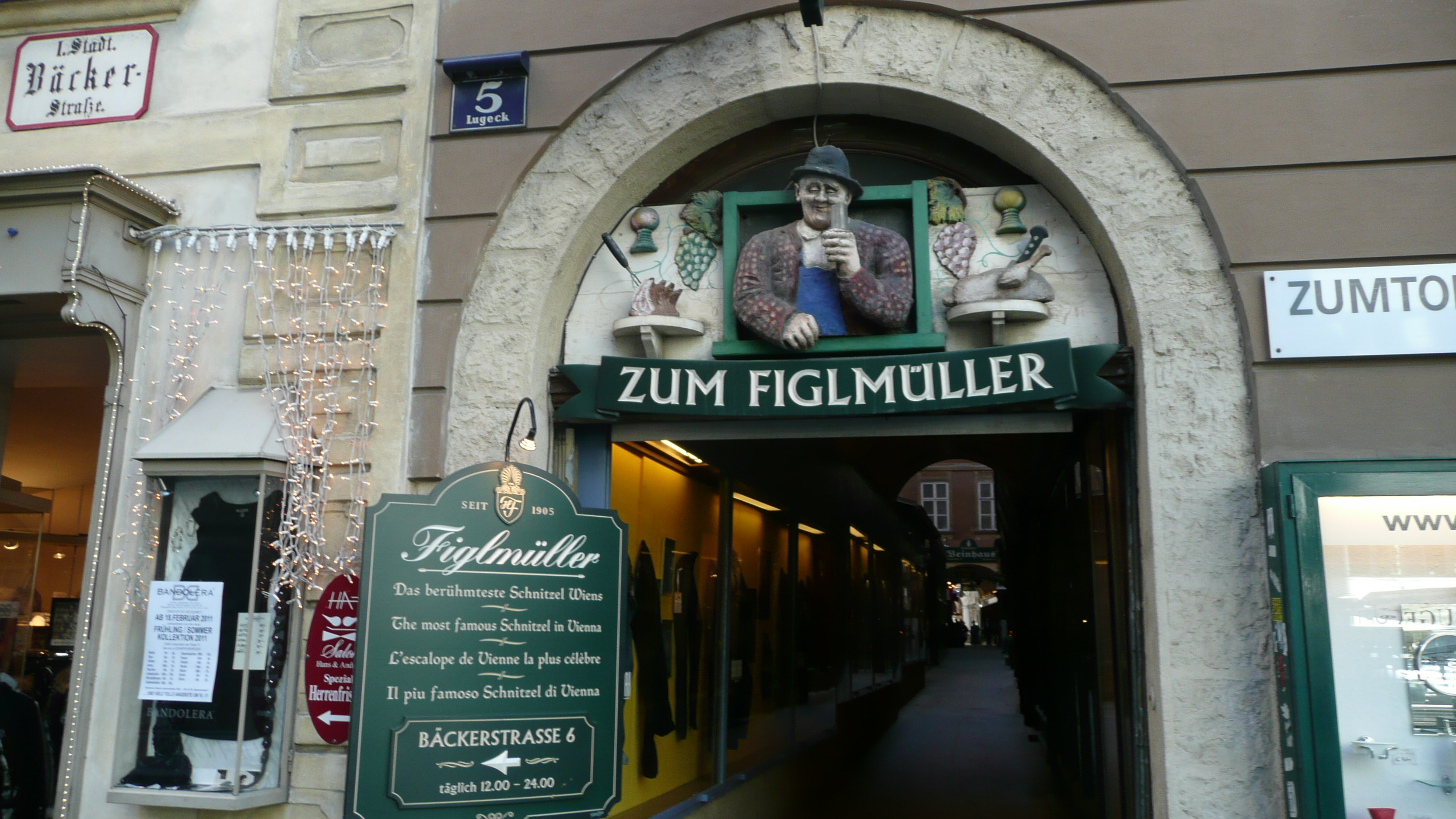 Blick auf die Wollzeile von der Bäckerstraße aus - Wegweiser zu den beiden Figlmüller-Restaurants im Stadtzentrum von Wien